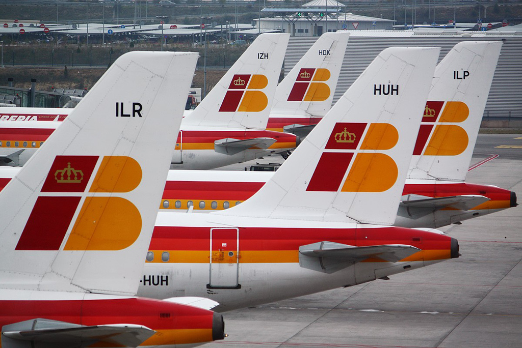 Airbus A319 et A320